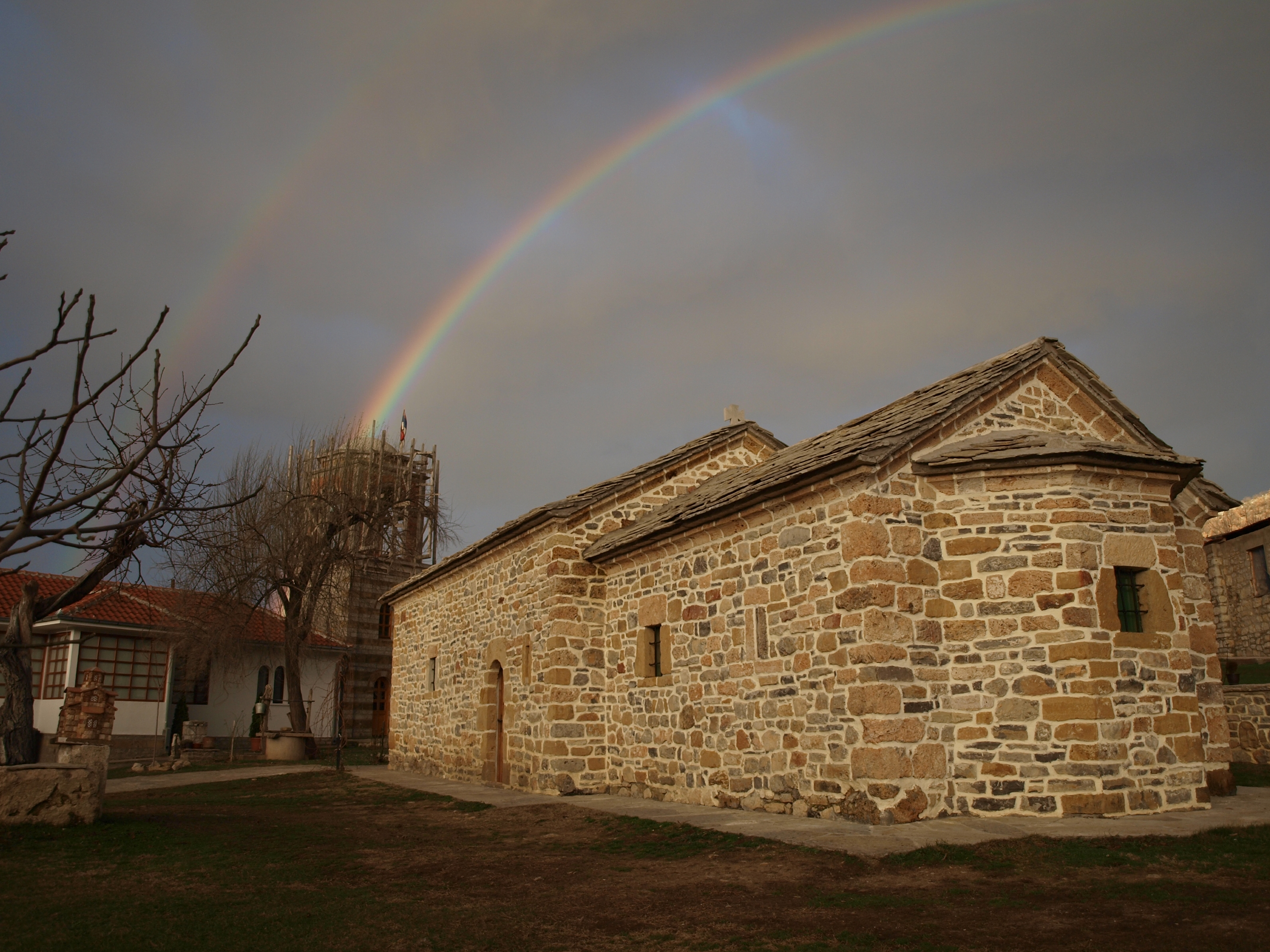 Zočište Monastery